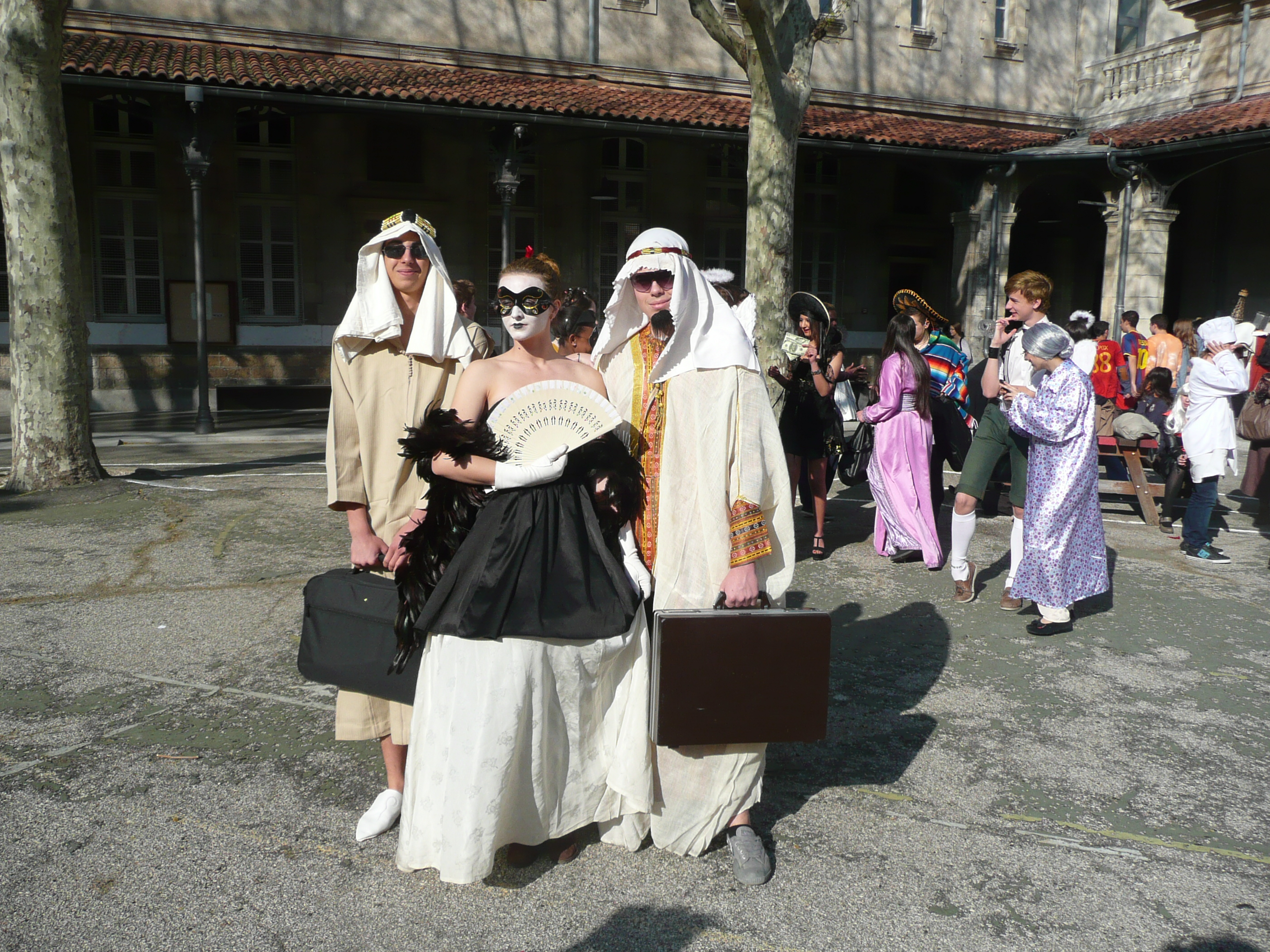 karneval ve Francii